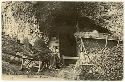 La grotte du pere Adam